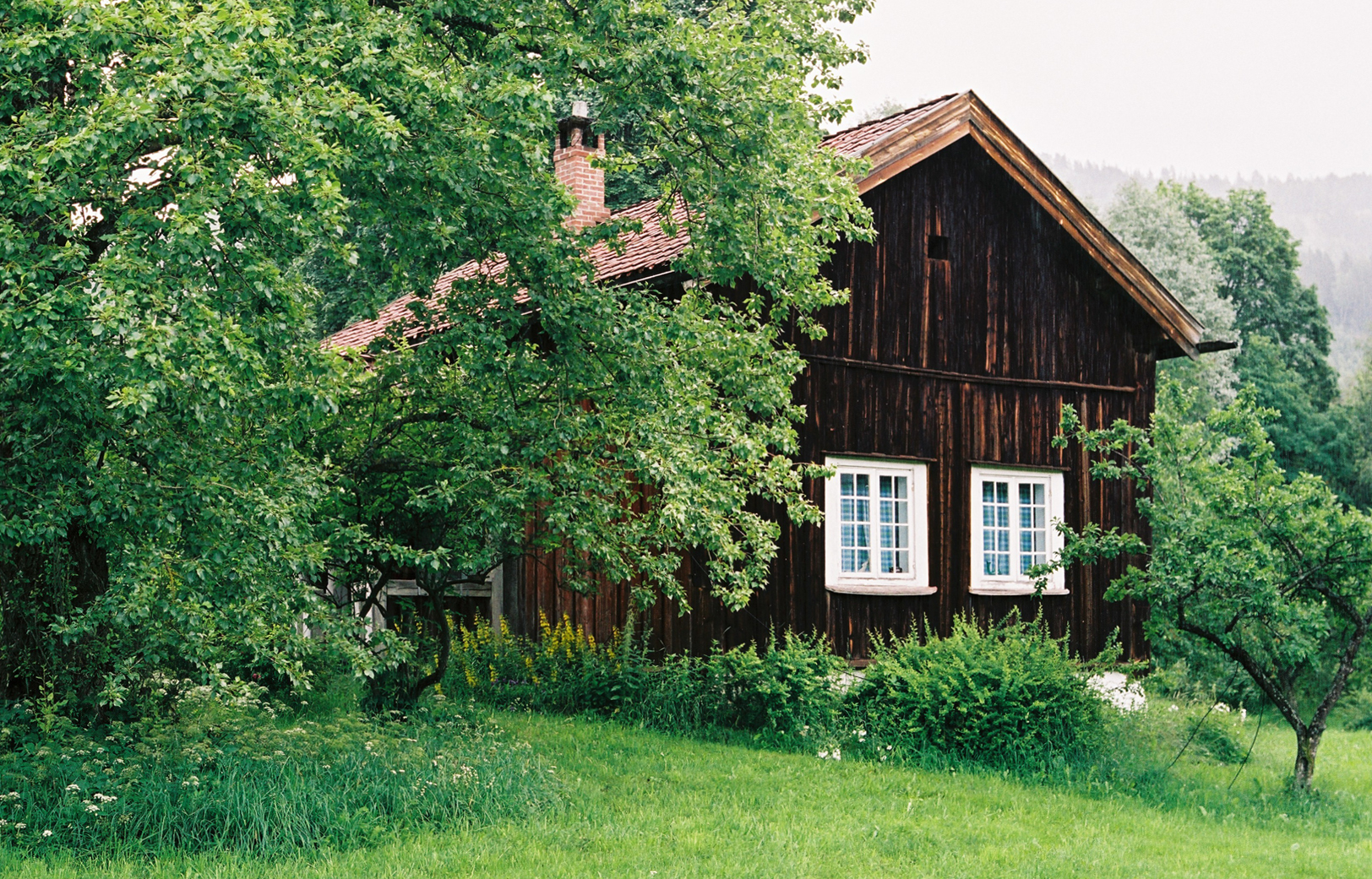 Bispestua, Rollag prestegard, Buskerud. Freda 1991.